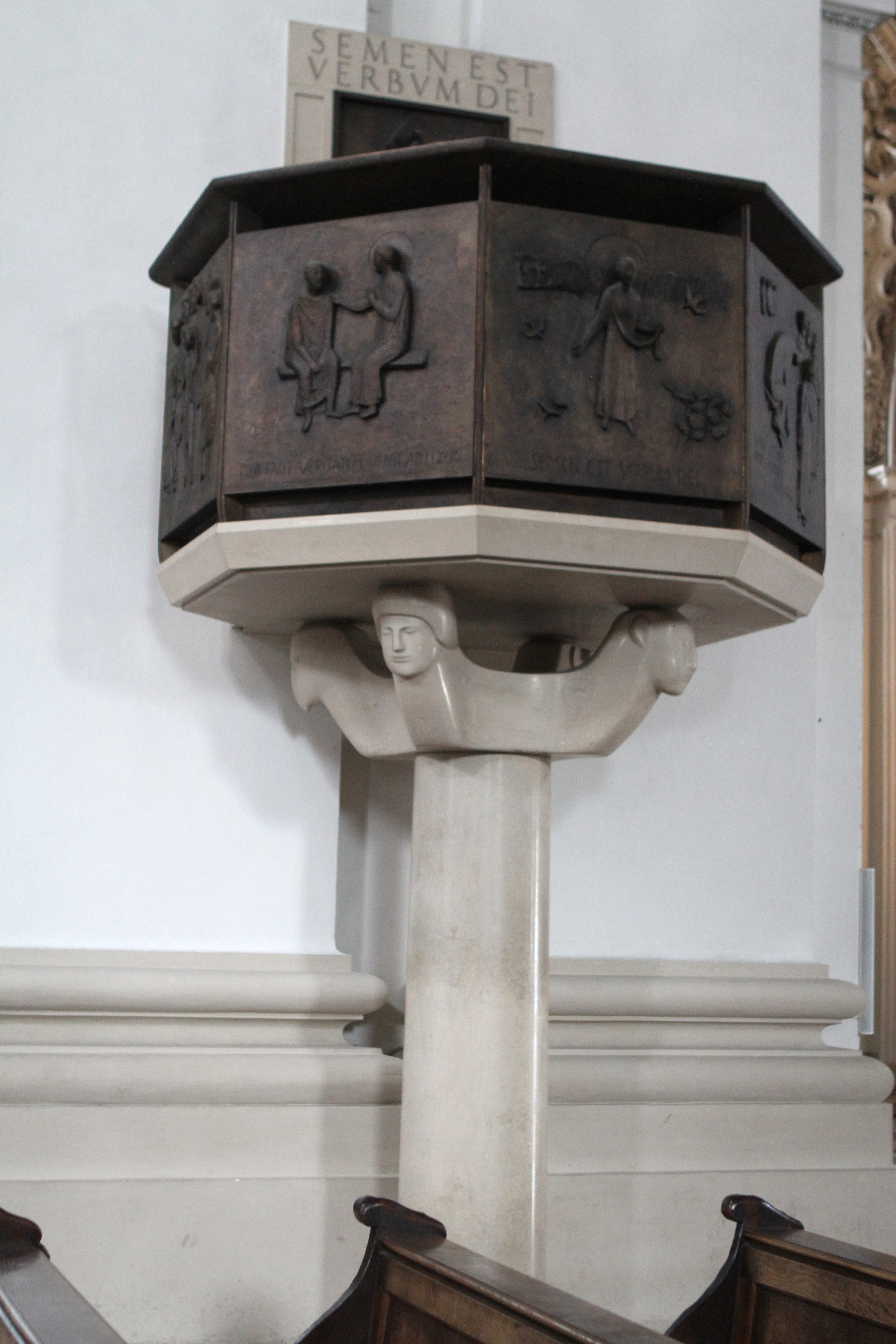 Dom, hll. Rupert und Virgil